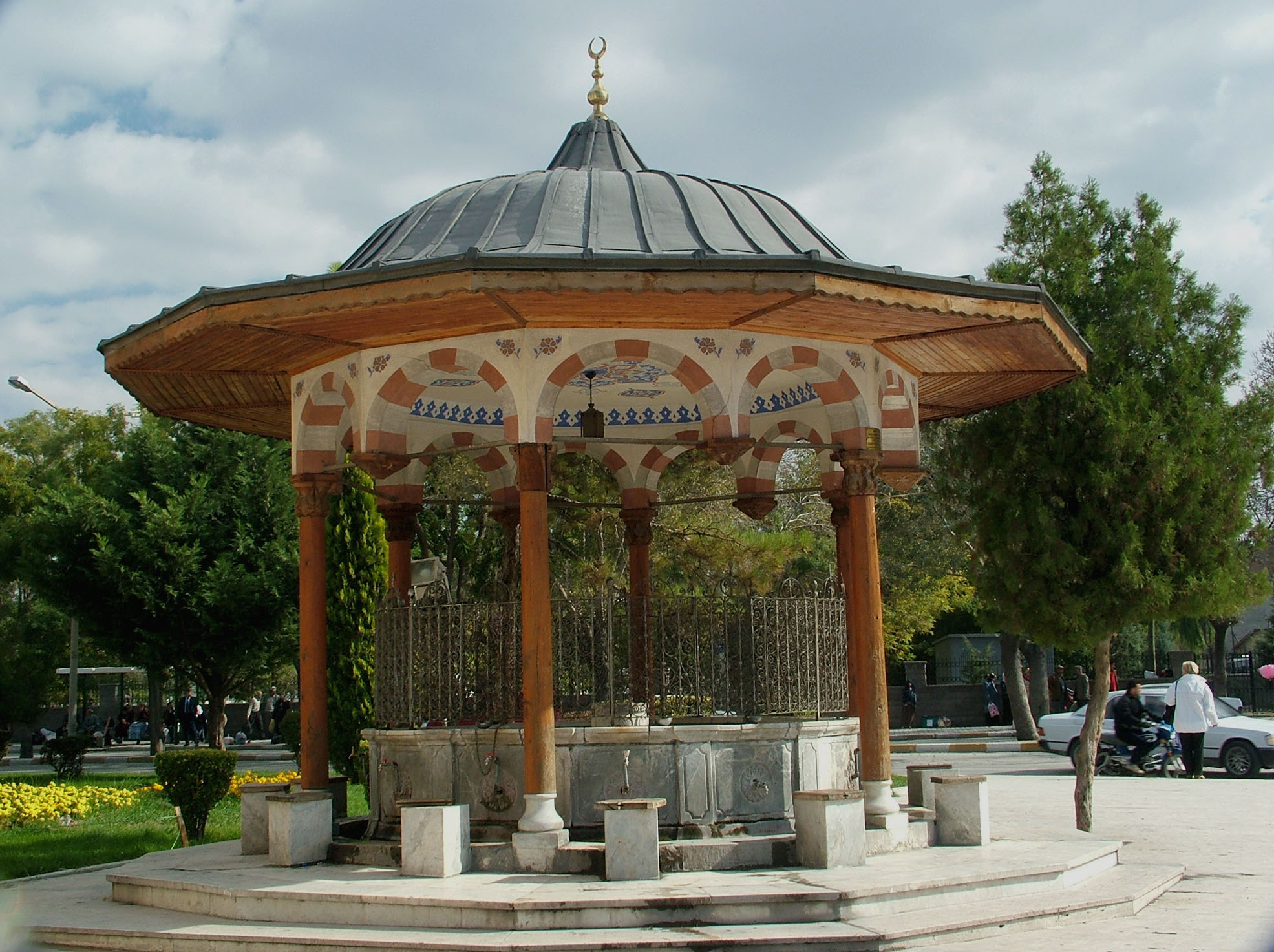 Közkút a Szelimije-dzsáminál (Konya, Törökország)